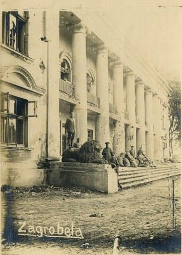 Палац Загребелля (Тернопіль)